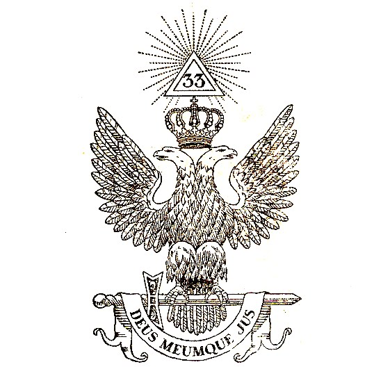 L'Aigle à deux têtes, emblème des hauts grades maçonniques du Rite écossais ancien et accepté.